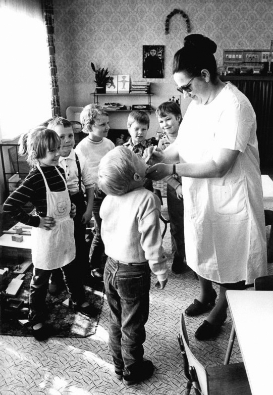 Pinnow, Gemeindeschwester im Kindergarten ADN-ZB Pätzold-2-5-86 Bez. Schwerin: Kandidaten-Den Mädchen und Jungen des Kindergartens Pinnow ist das Gesicht von Gemeindeschwester Monika Kümmel längst vertraut, denn sie besucht sie regelmäßig. Seit zehn Jahren engagiert sich die Bezirkstagsabgeordnete (CDU) für die weitere Verbesserung der gesundheitlichen Betreuung bei der Landbevölkerung. Erneut erhielt sie das Vertrauen ihres Kollektivs für eine Kandidatur im Bezirkstag Schwerin. (siehe auch 18 und 20 N)